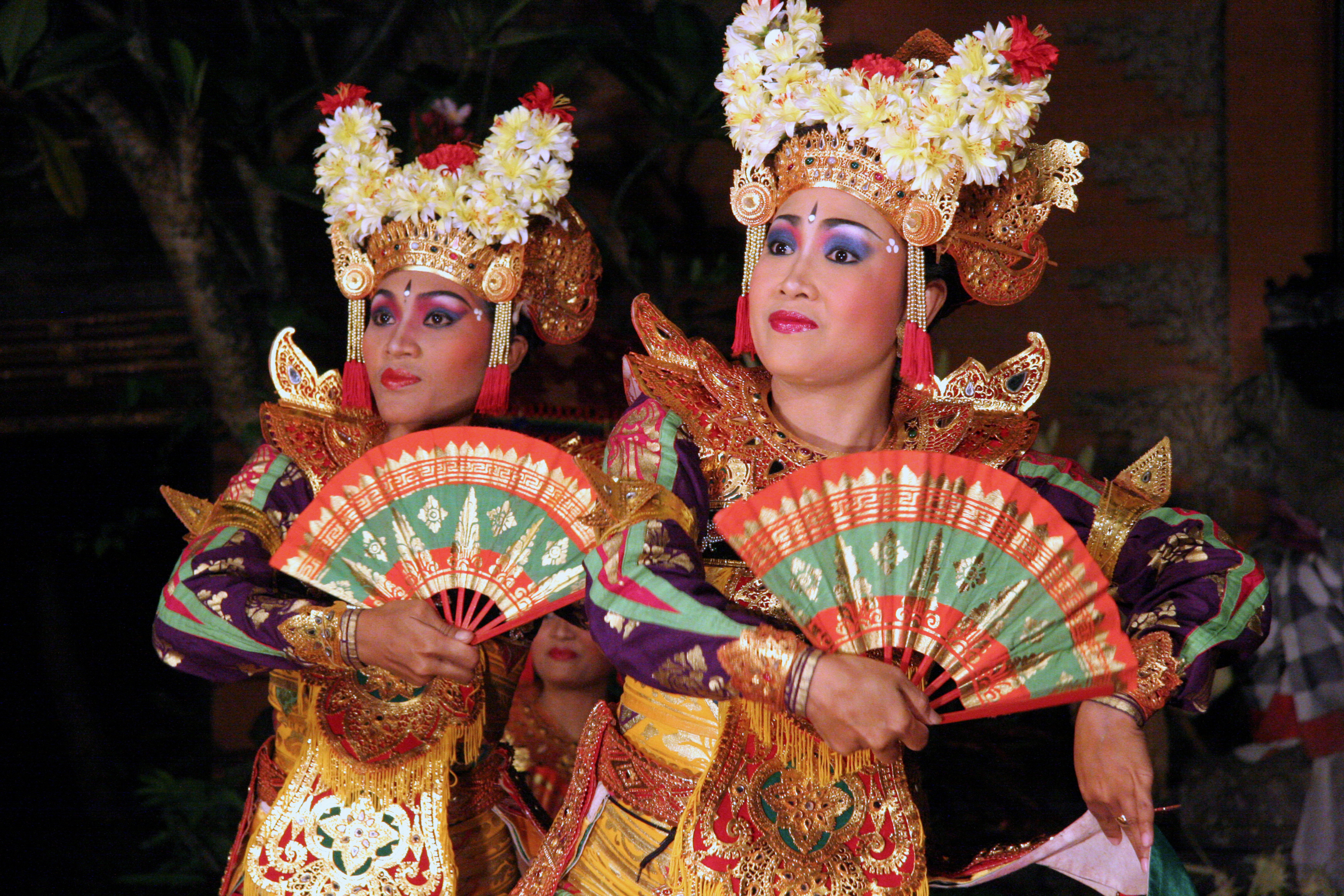 bali Ubud danseuse